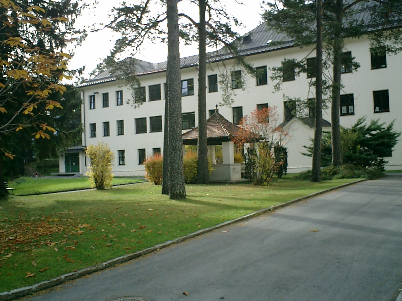 Der Ostflügel des LKH Hochzirl